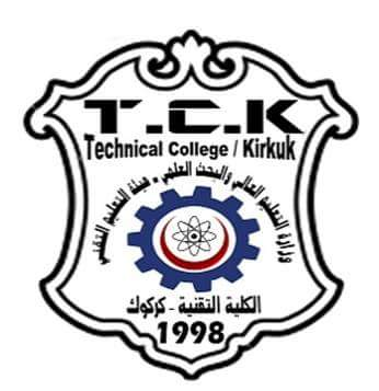 الشعار الرسمي للكلية التقنية كركوك